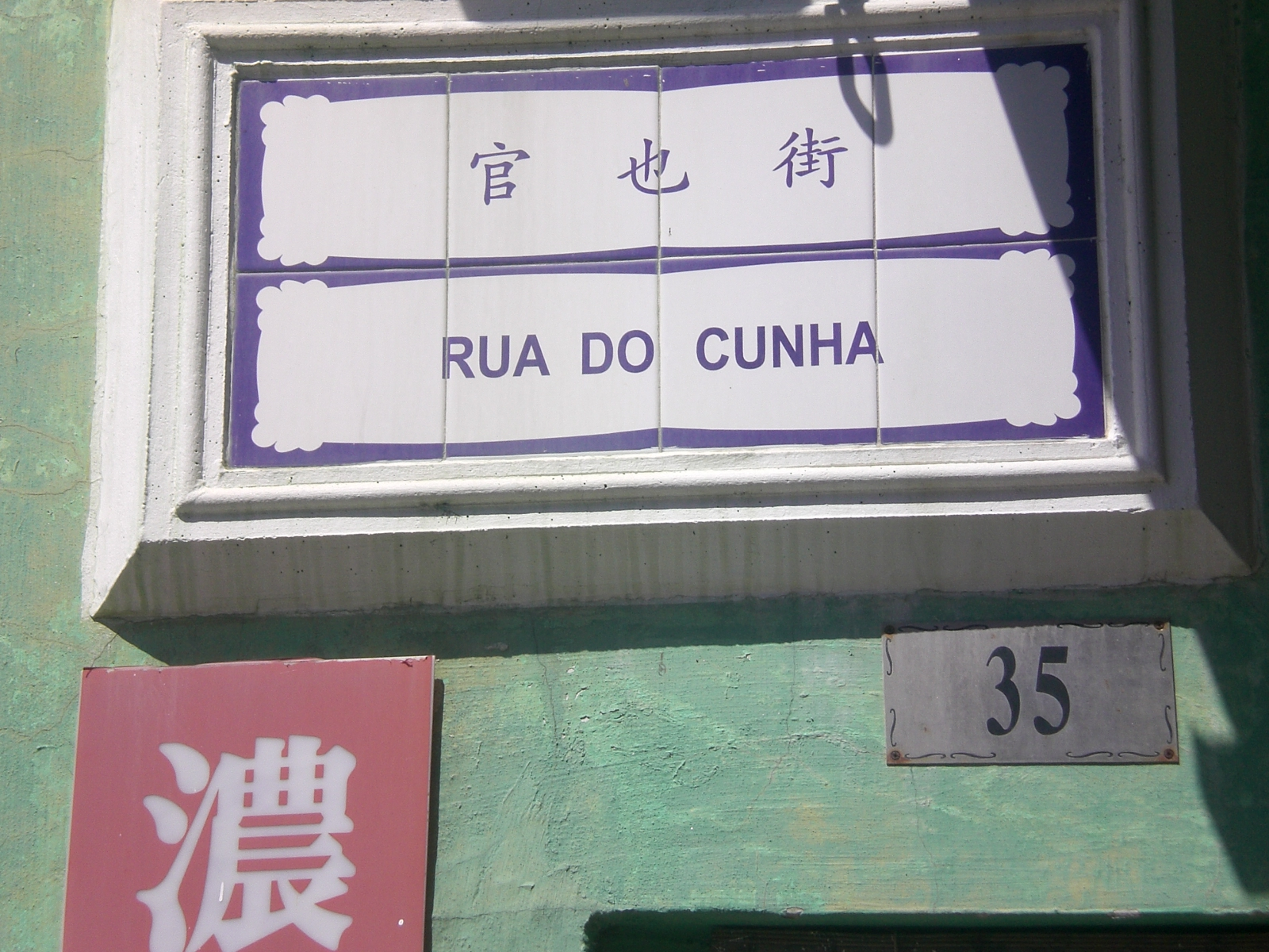 官也街, Rua do Cunha是一條位於氹仔的手信街及飲食綜合遊客區.